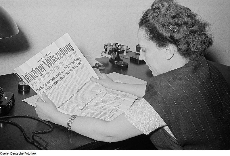 Original image description from the Deutsche Fotothek Porträt von Margarete Däumichen mit der Leipziger Volkszeitung